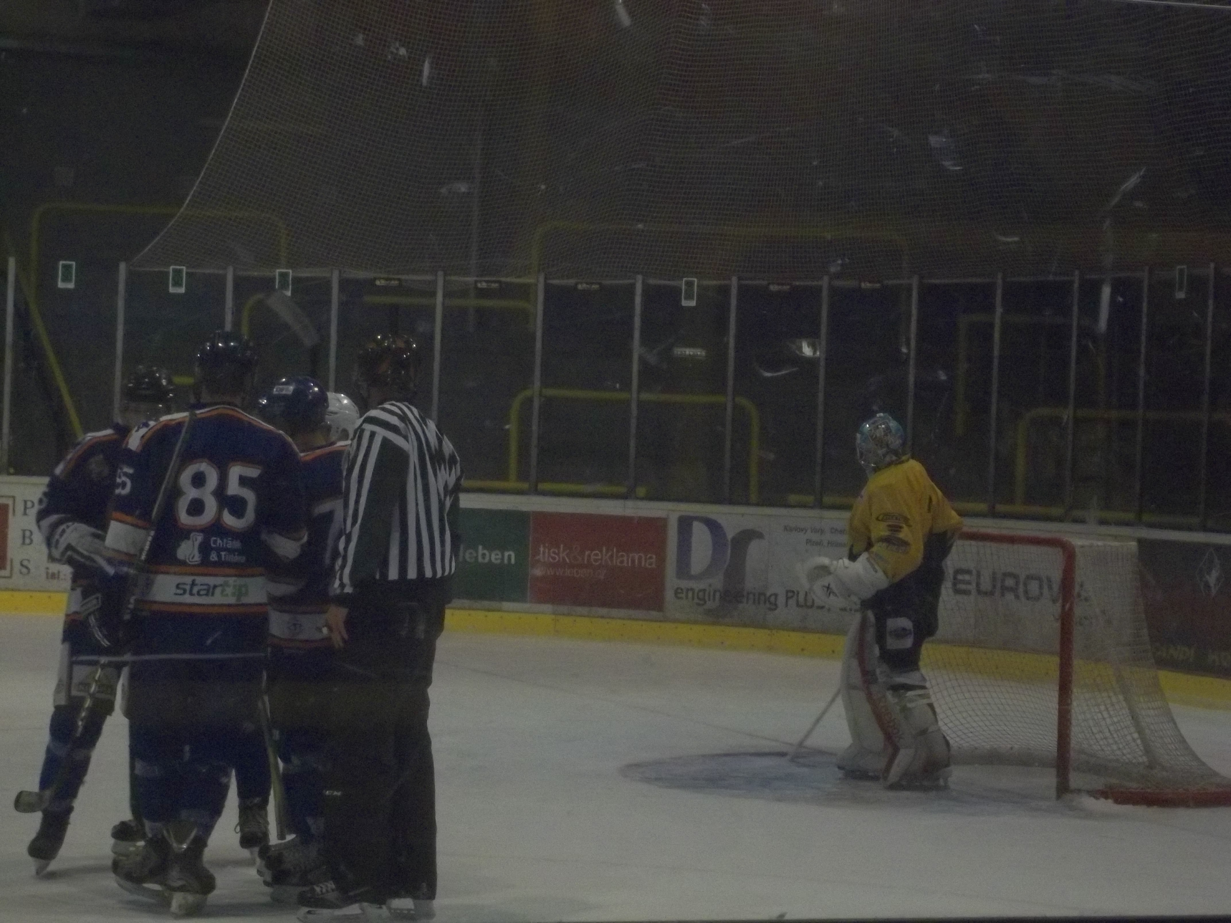 Baník Sokolov-Stadion Litoměřice